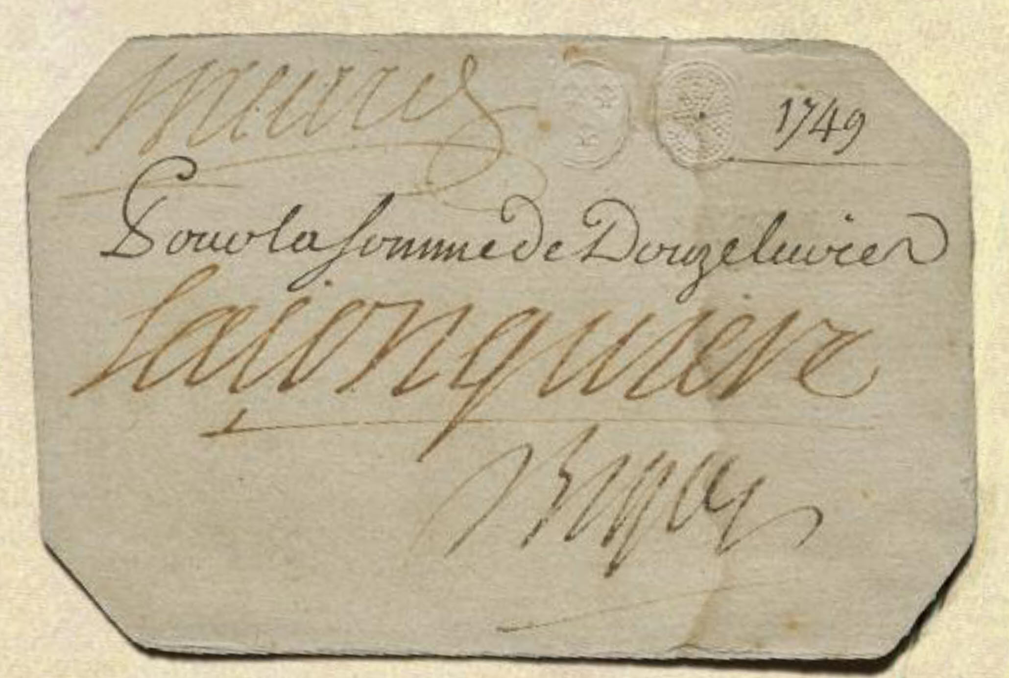 Canada, Régime français, monnaie de carte, 12 livres, 1749.